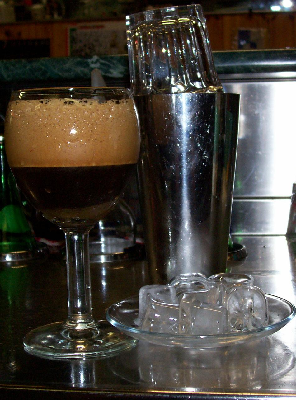 foto di caffè Scheckerato. foto scattata da "Burghy". Pubblico dominio